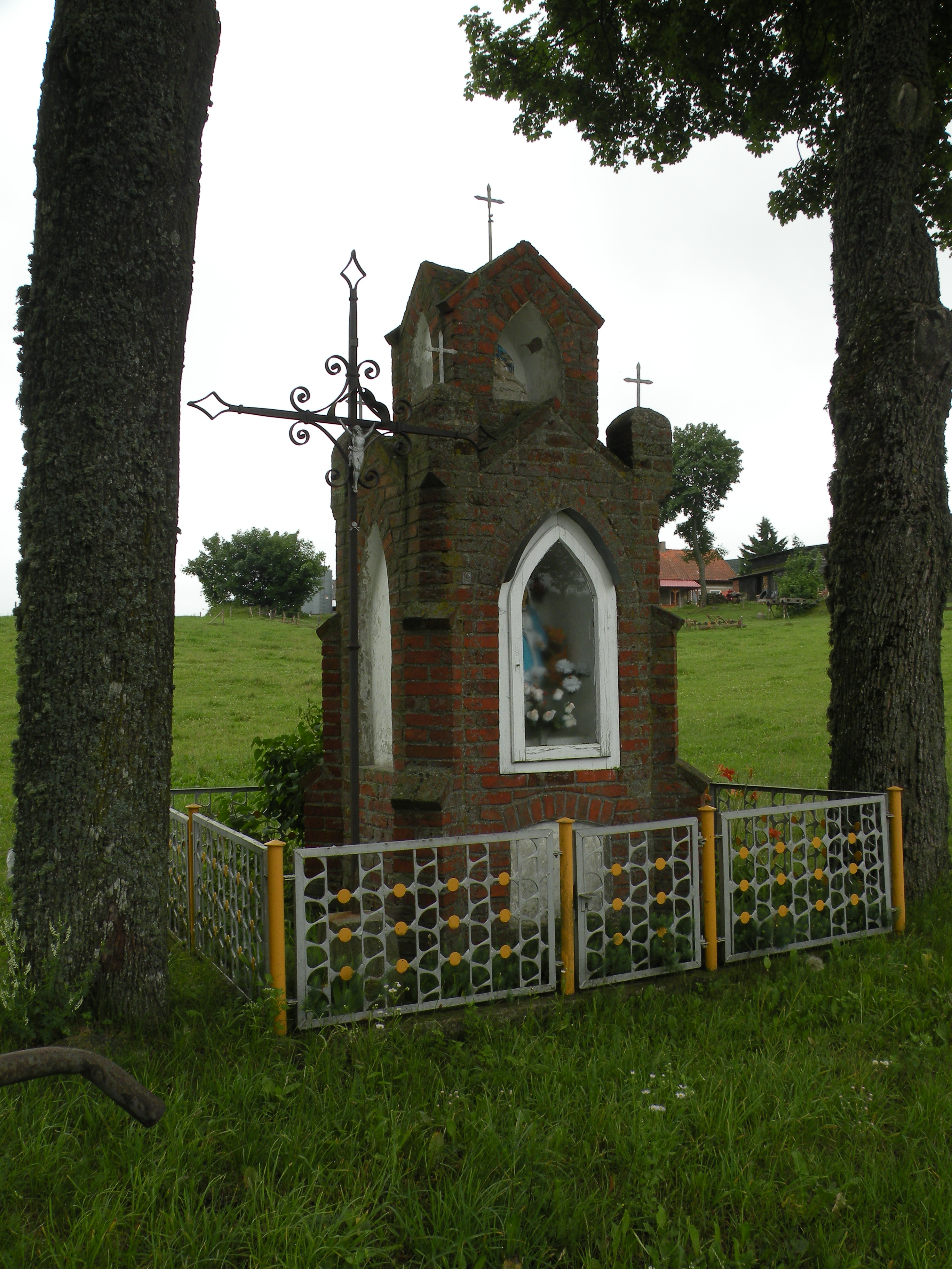 Rzeck koło Biskupca - zabytkowa kapliczka przydrożna